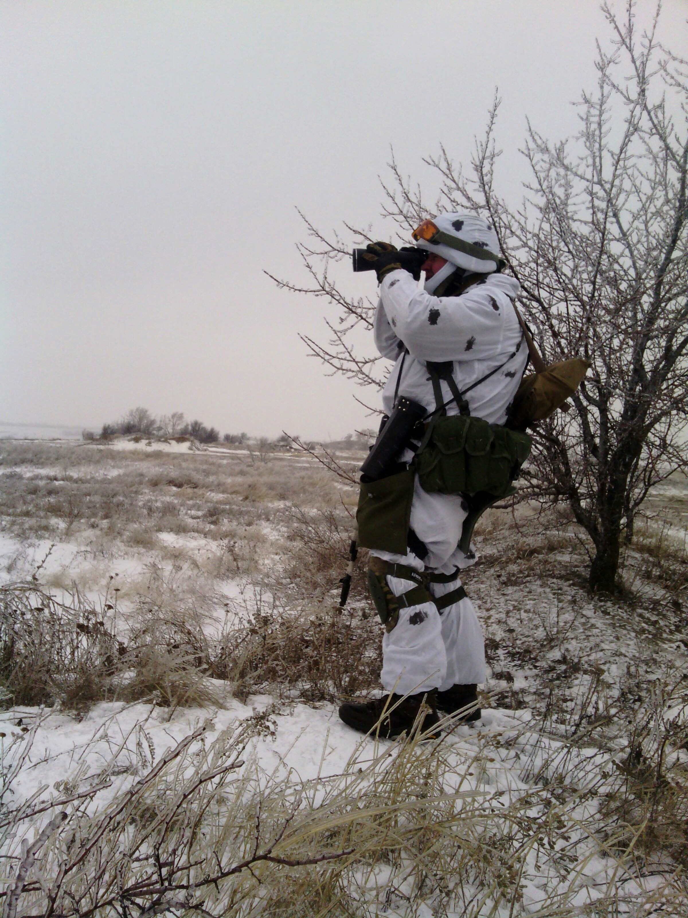 Український спецпризначенець здійснює спостереження ворожих позицій в зоні проведення АТО. Фото зроблено у січні 2015 року, на території Луганської області України.